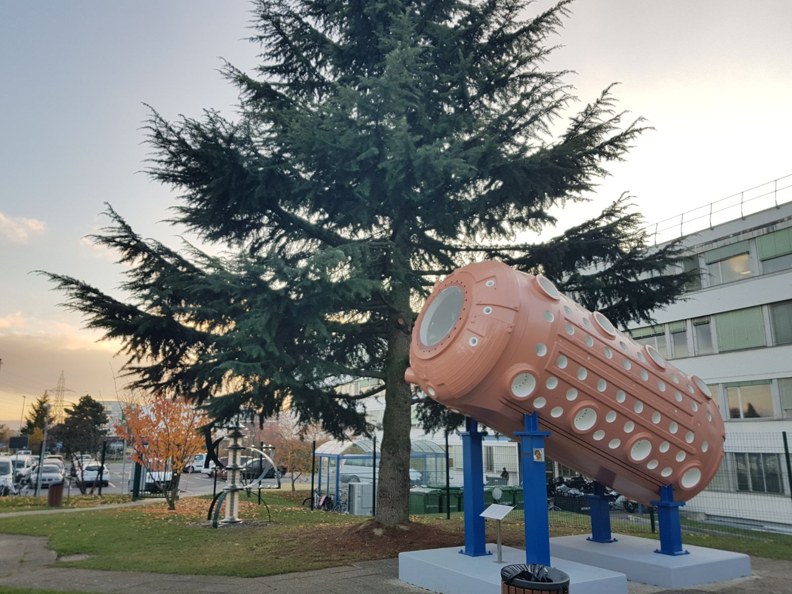 תמונה של גלאי החלקיקים גרגמל בסרן, שוויץ